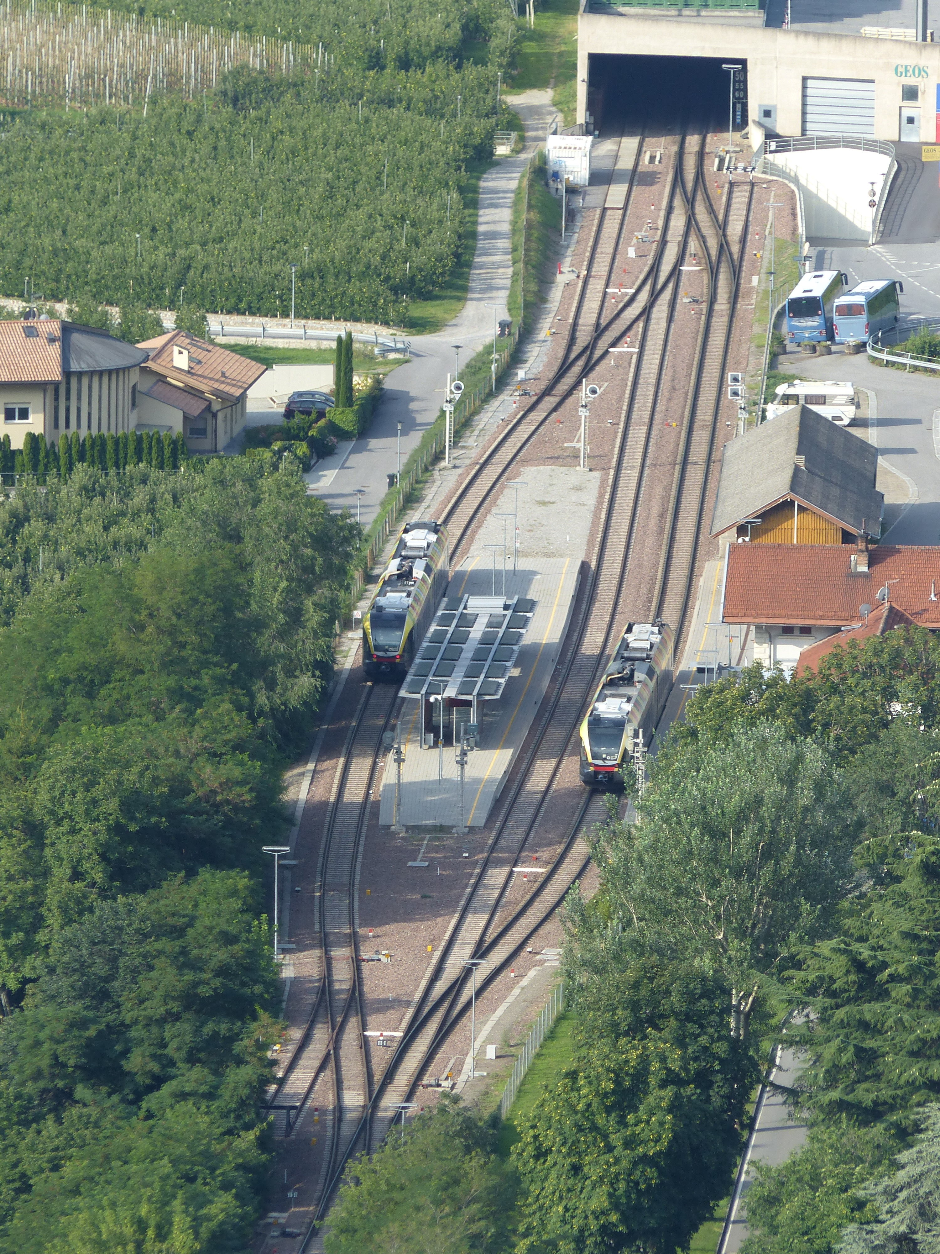 Bahnhof Schlanders (Blick vom unteren Sonnenhang)